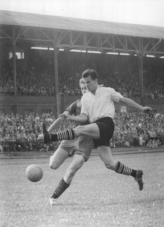 Zentralbild-Wlocka Me 17.8.58 SC Rotation Leipzig gegen SC Lokomotive Leipzig - Im Lokalderby der Messestadt Leipzig standen sich die Oberligavertretungen von SC Rotation Leipzig und SC Lokomotive Leipzig im vollbesetzten Bruno-Plache-Stadion am 17. August 1958 gegenüber. Die Ortsrivalen trennten sich mit 4:2 für SC Lokomotive. UBz: Pfeufer (SC Rotation) versucht Scherbath (links) am Schuss zu hindern.